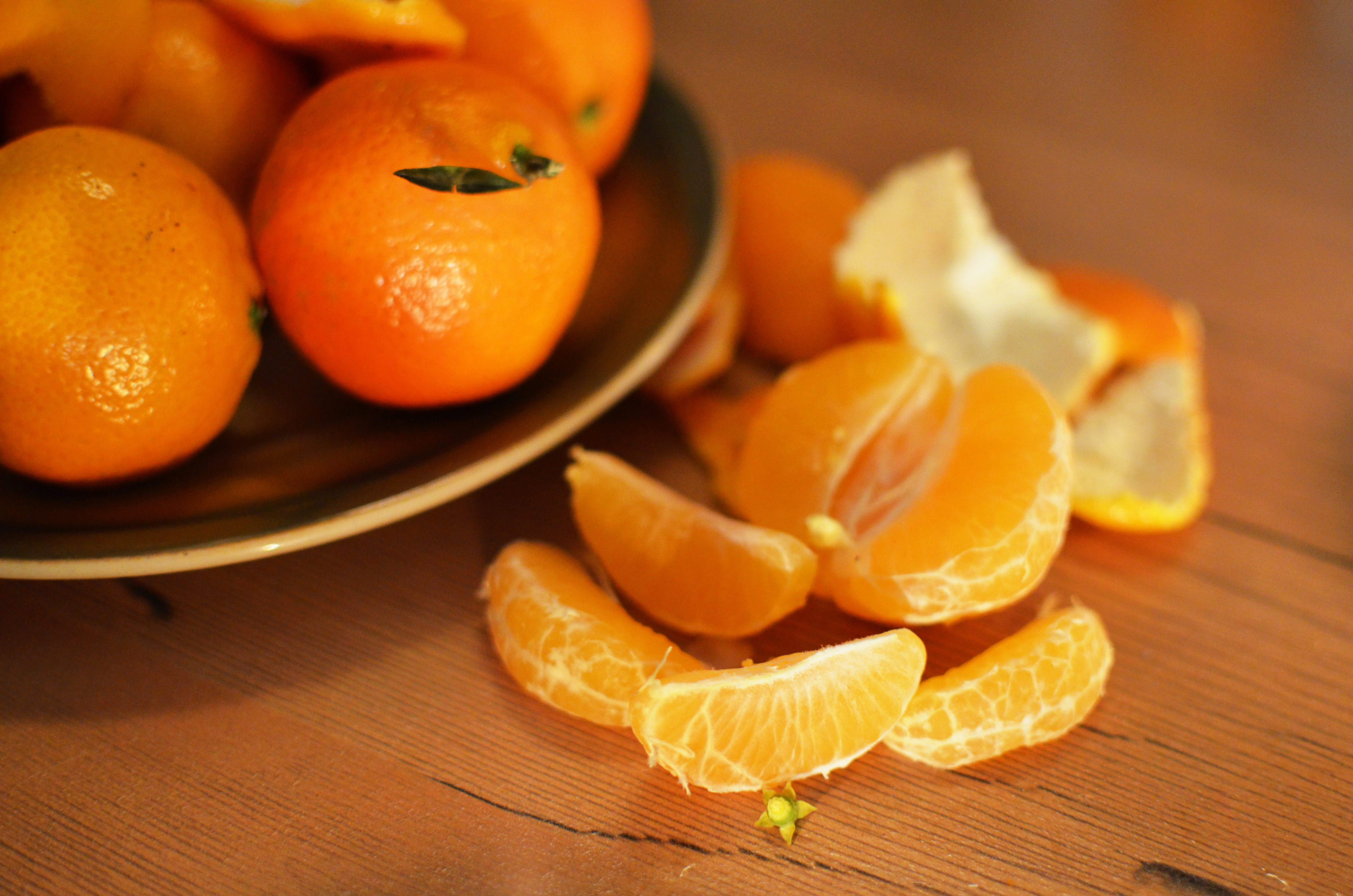 fruits-oranges-tangerines